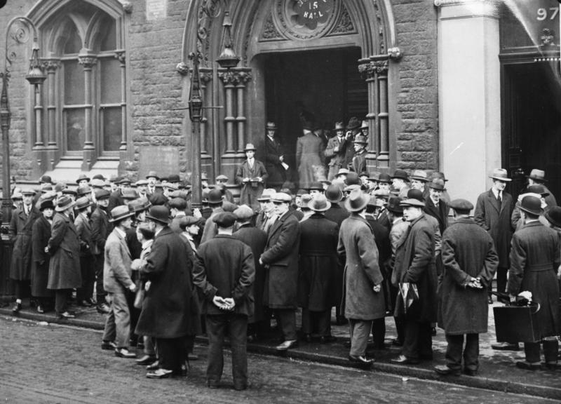 Grosse Arbeitslosigkeit auch in England ! Im Monat Juli wurden in England über 2 Millionen Arbeitslose gezählt. Es ist eine Ziffer, wie sie England noch nicht aufzuweisen hatte. Arbeitslose vor dem Gewerkschaftshaus in London auf Arbeit wartend.